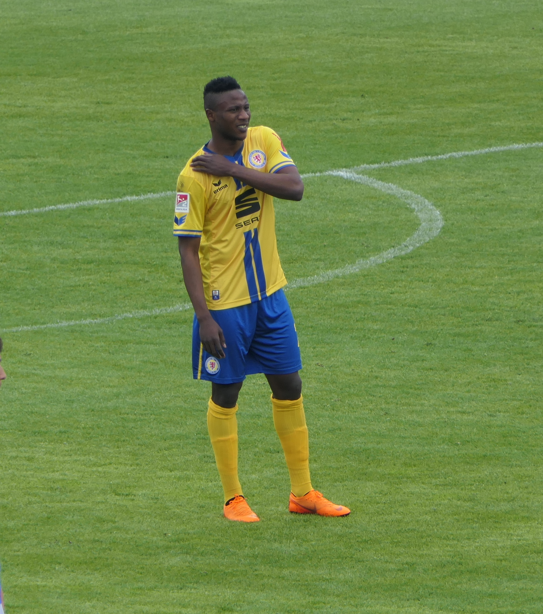 Der Fußballprofi Suleiman Abdullahi im Trikot von Eintracht Braunschweig beim Auswärtsspiel beim SV Darmstadt 98 am 15.04.2018.